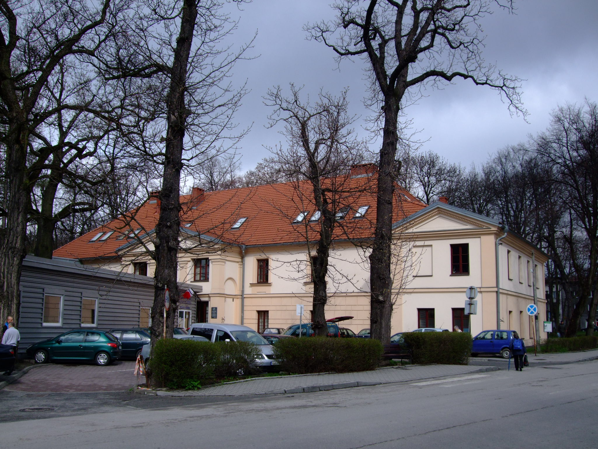 Łazienki "Zofia" - główna siedziba Ośrodka Rehabilitacji Narządów Ruchu w Krzeszowicach. Fundatorka Zofia z Branickich.